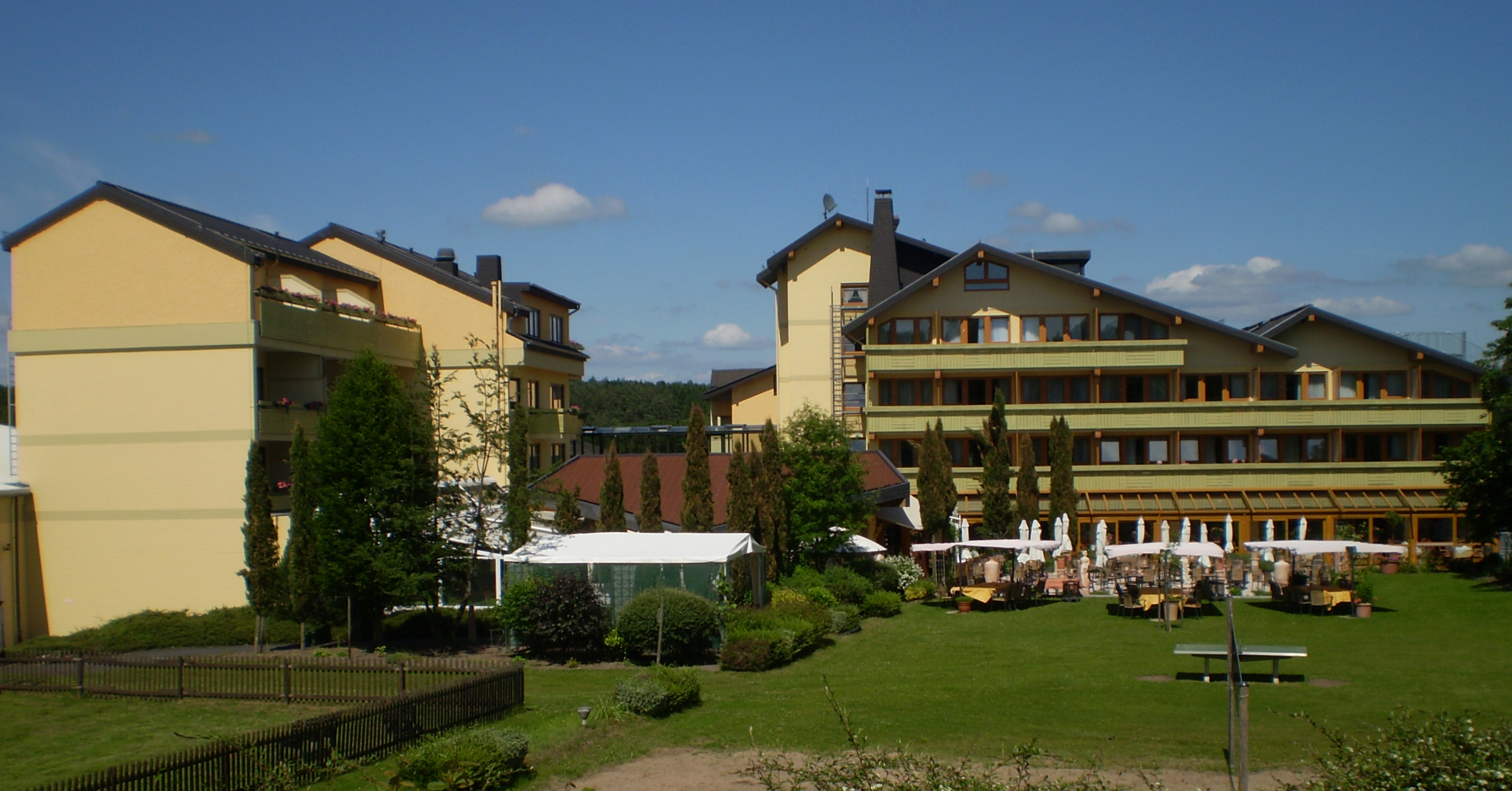 Hotel Dorint Golf & Spa Windhagen / Siebengebirge (2014 geschlossen; seit 2015 Dormero Hotel Bonn Windhagen), Rederscheid